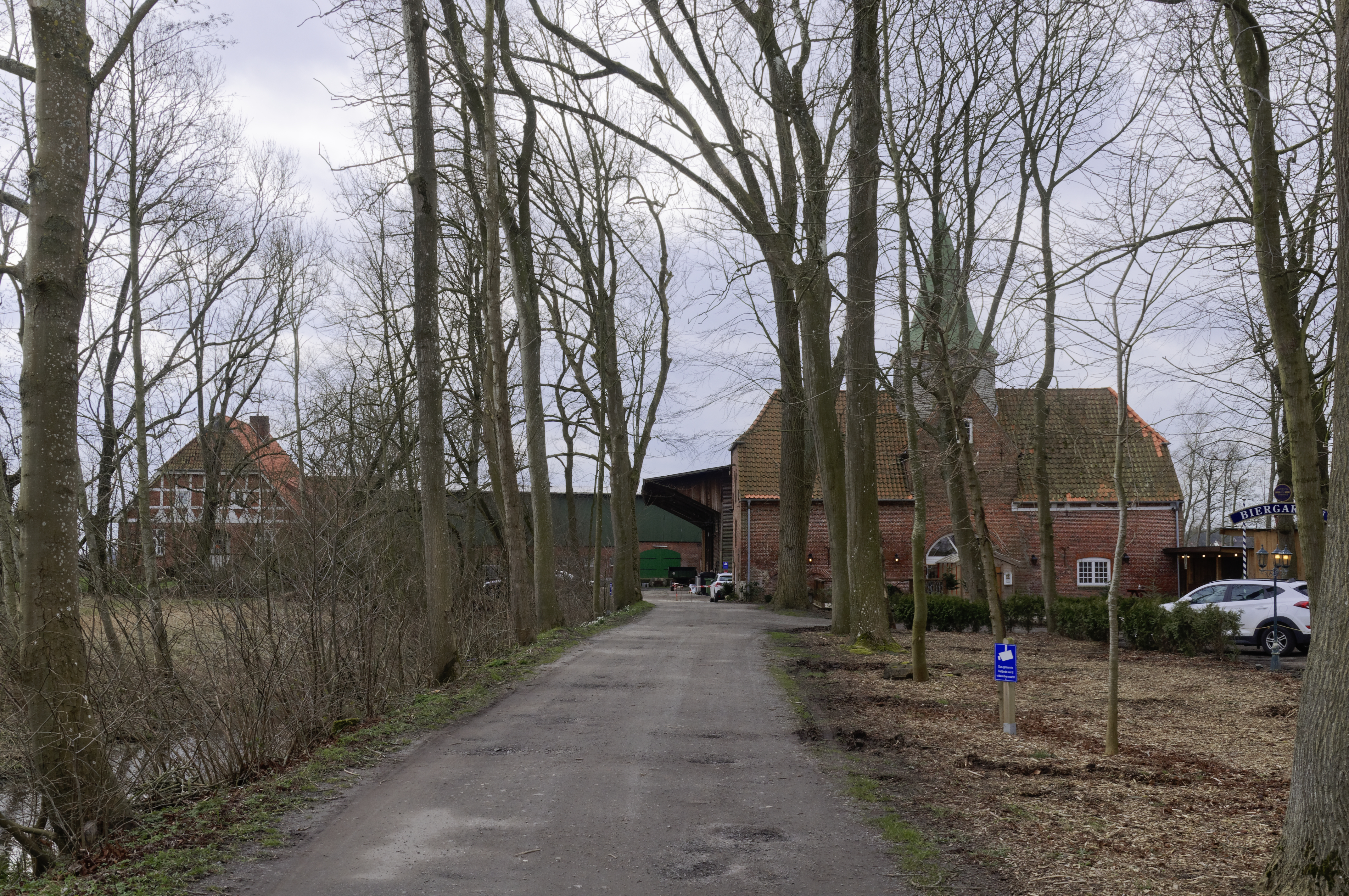 Cuxhaven Altenwalde -mix- 2020